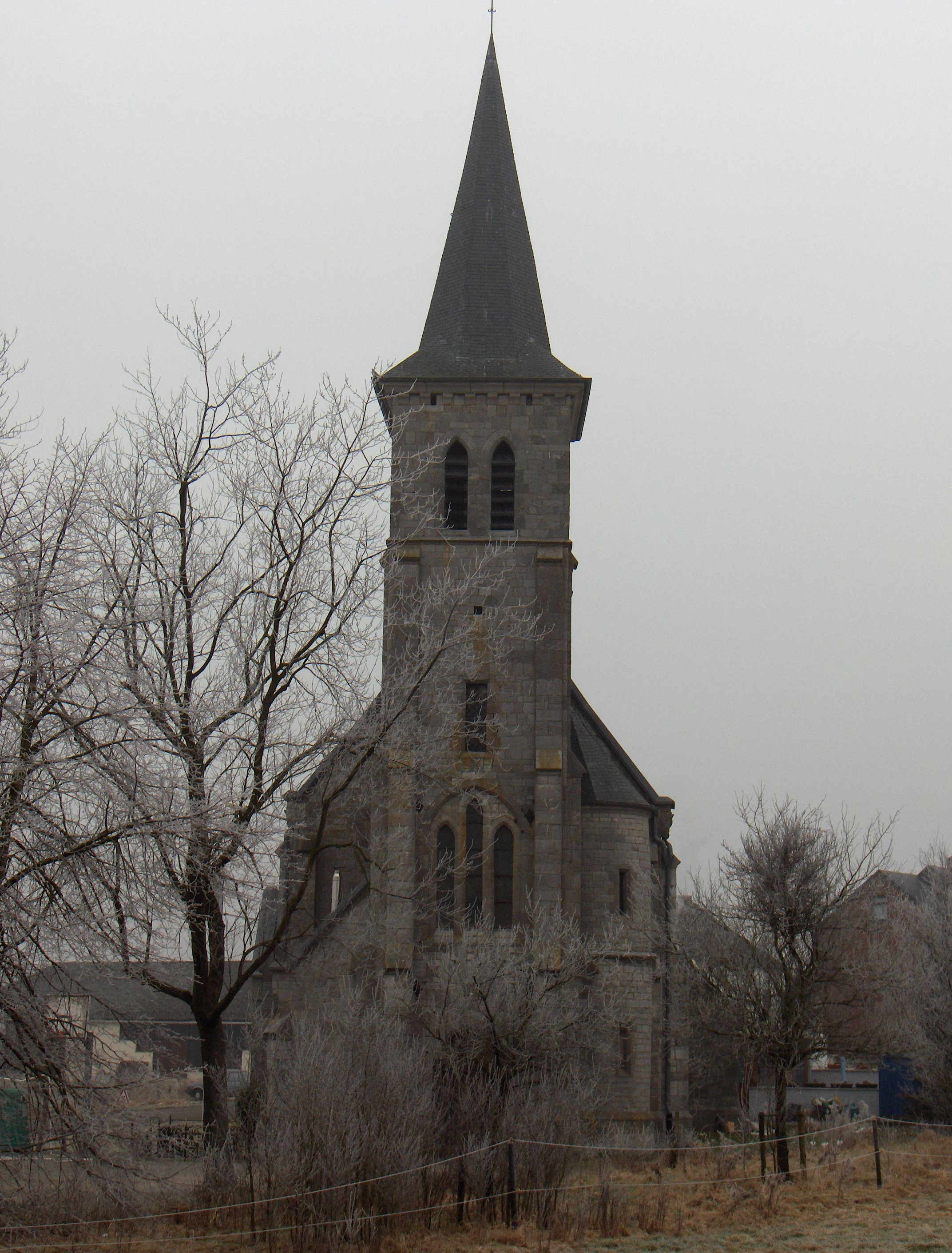 Beschreibung: Géronsart (Weiler/Ortsteil der Gemeinde Couvin in Belgien, Prov. Namur), Antonskirche (église Saint-Antoine-de-Padou). Anblick von Westen. Typische neugotische Dorfkirche des späten 19. Jh.s (1894). Datum: 2. Februar 2006. Fotograf: Friedrich Tellberg